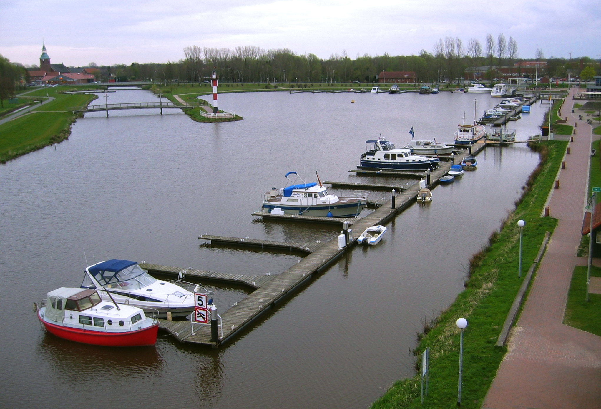 Barßel: Bootshafen an der Soeste (links)/am Zandersee, angeblich mit der Nachbildung des Leuchtturms „Roter Sand“ - der Leuchtturm sieht dem Leuchtturm Roter Sand allerdings nicht ähnlich